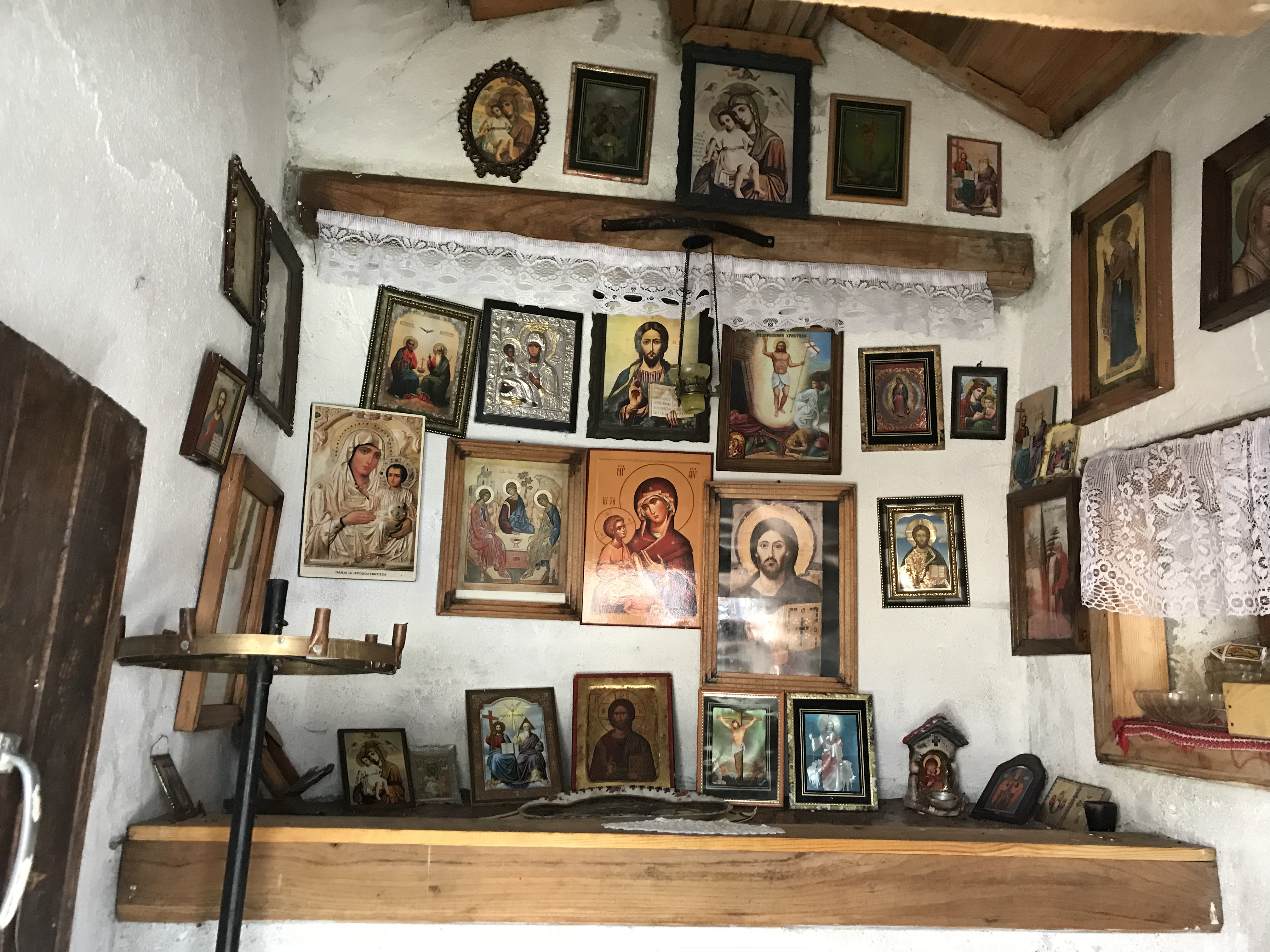 Икони в параклиса “Св. Дух”, с.Бойково